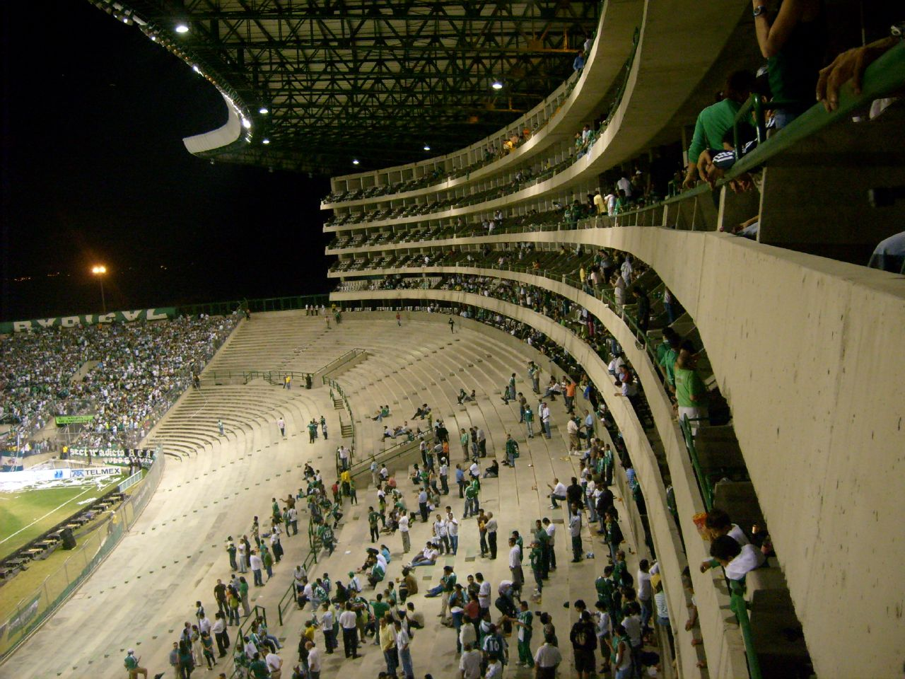 Estadio Deportivo Cali - Palmaseca Valle del Cauca - Colombia